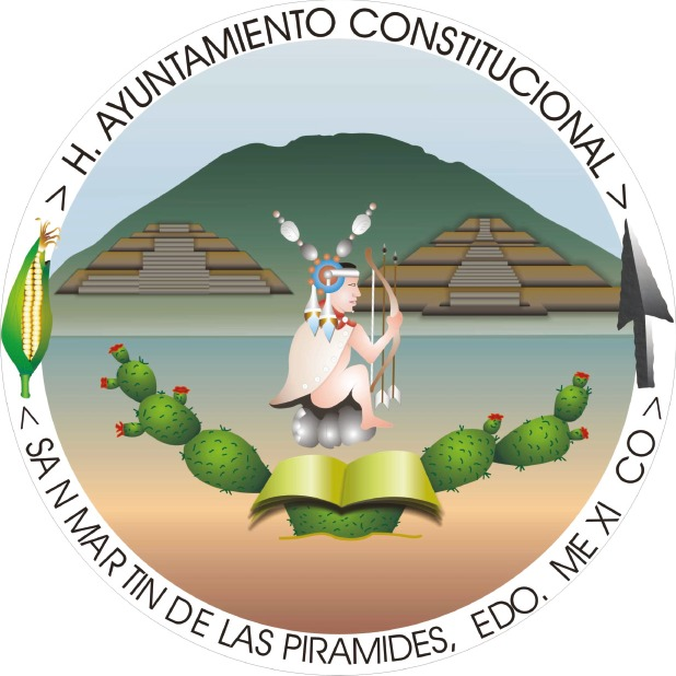 Elementos que se tomaron en consideración para su elaboración En primer término, y como elemento natural de mayor antigüedad, se tomó al Cerro Gordo o Temictepetl que significa “cosa grande rellena”, el cual aparece como fondo. Enseguida se colocaron a las pirámides, que originalmente fueron propiedad territorial de San Martín y que actualmente forman parte de su nombre. Al centro, un personaje chichimeca, cuyo dato testimonial más antiguo se localizó en el archivo histórico municipal, donde cuenta la leyenda que la acompaña, se trata de un “Gran Fundador Chichimeca”, por los atuendos que le adornan así puede considerarse. Un poco más abajo aparece un nopal abrién-dose a la derecha y a la izquierda, que por ser la planta característica de la región y ser también la que en buena parte da sustento al municipio, simbolizando los brazos abiertos en señal de fraternidad y las siete tunas en flor representan a las siete comunidades que integran el municipio. El libro abierto expresa la juventud y una permanente invitación a la cultura. A los lados aparece una mazorca y una punta de flecha, que significan que en su campo, en un tiempo no muy lejano, se produjo maíz en abundancia, y la punta de flecha, que en su suelo se encuentra diseminada gran cantidad de pedacería de obsidiana utilizada en la fabricación de armamento indígena.